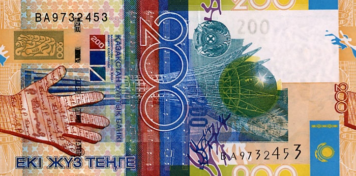 200 tenge